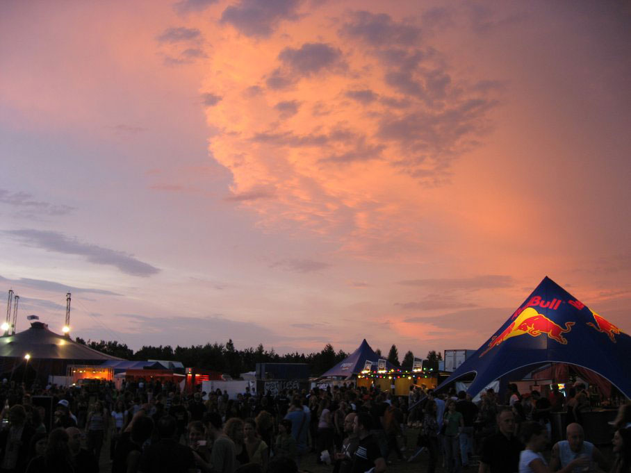 Das Obstwiesenfestival 2007 in der Abenddämmerung. Links sieht man das Zelt mit der 2. Bühne.